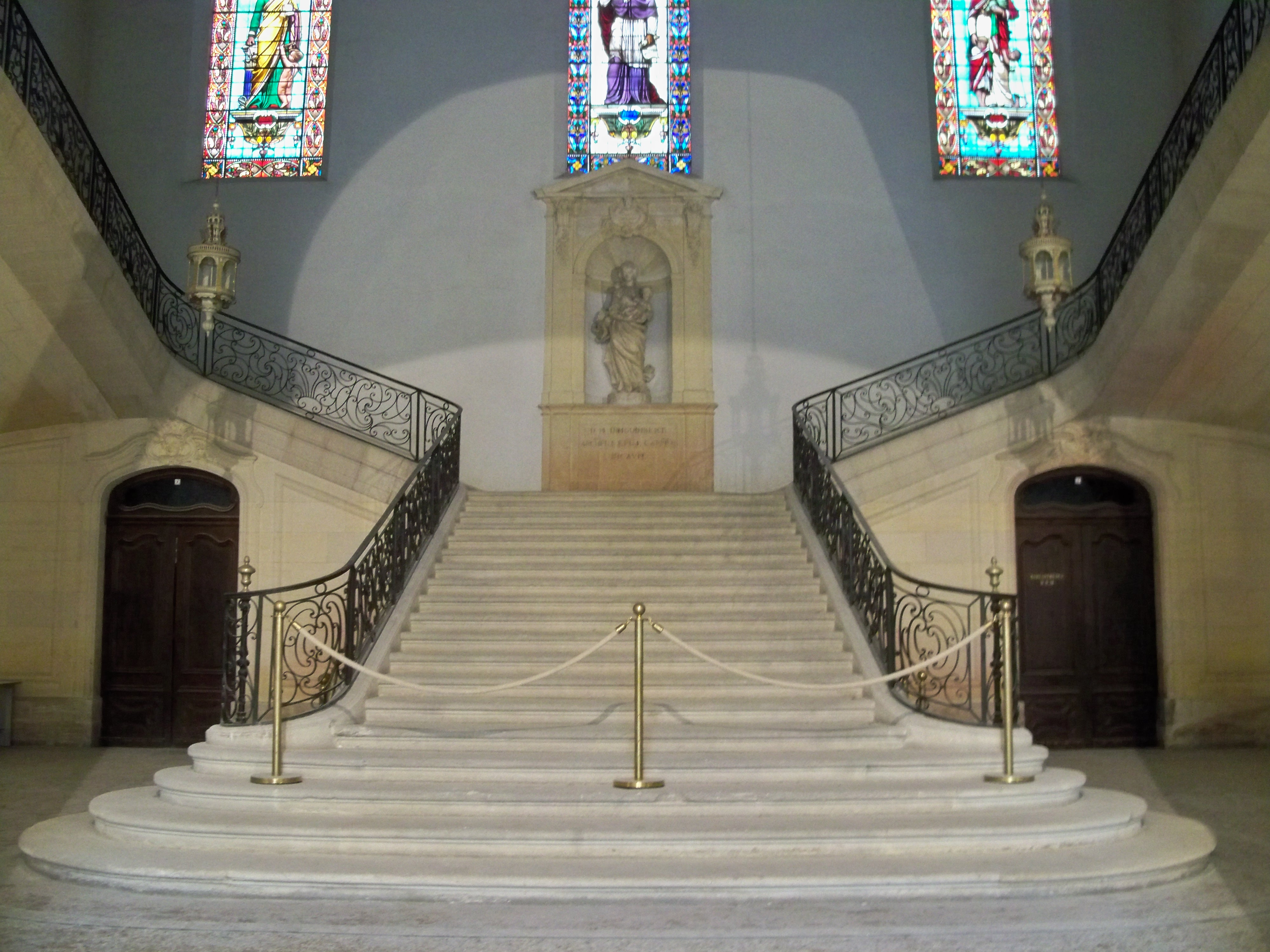 Hotel Dieu de Carpentras (84) escalier du hall d'honneur dont la rampe en fer forgé est classée M.H.